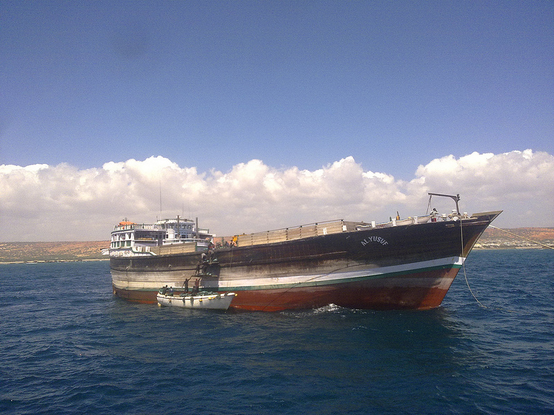 Soomaaliga: dooni dhuul raraysa baraawe Taken on January 12, 2012